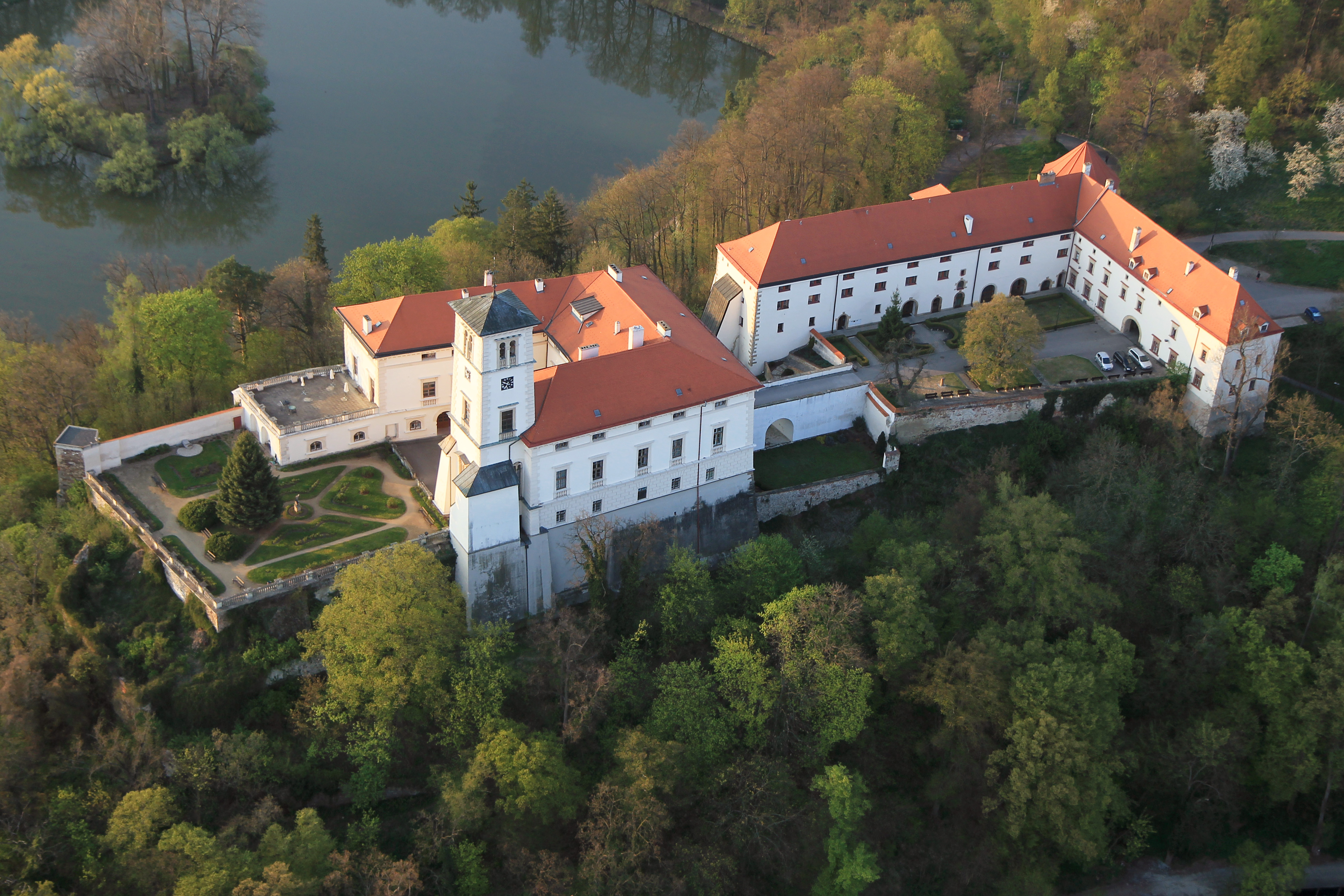 Zámek Černá Hora, Na pasece 1, Černá Hora (okres Blansko).